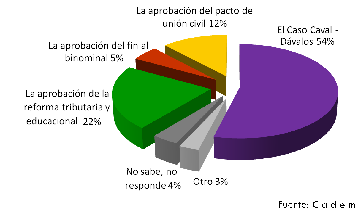 Resultados de la encuesta Cadem de 20 de abril de 2015, sobre cuál es el legado más importante del segundo gobierno de Michelle Bachelet